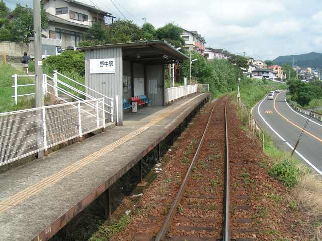 野中駅。投稿者が撮影(2006/08/28)